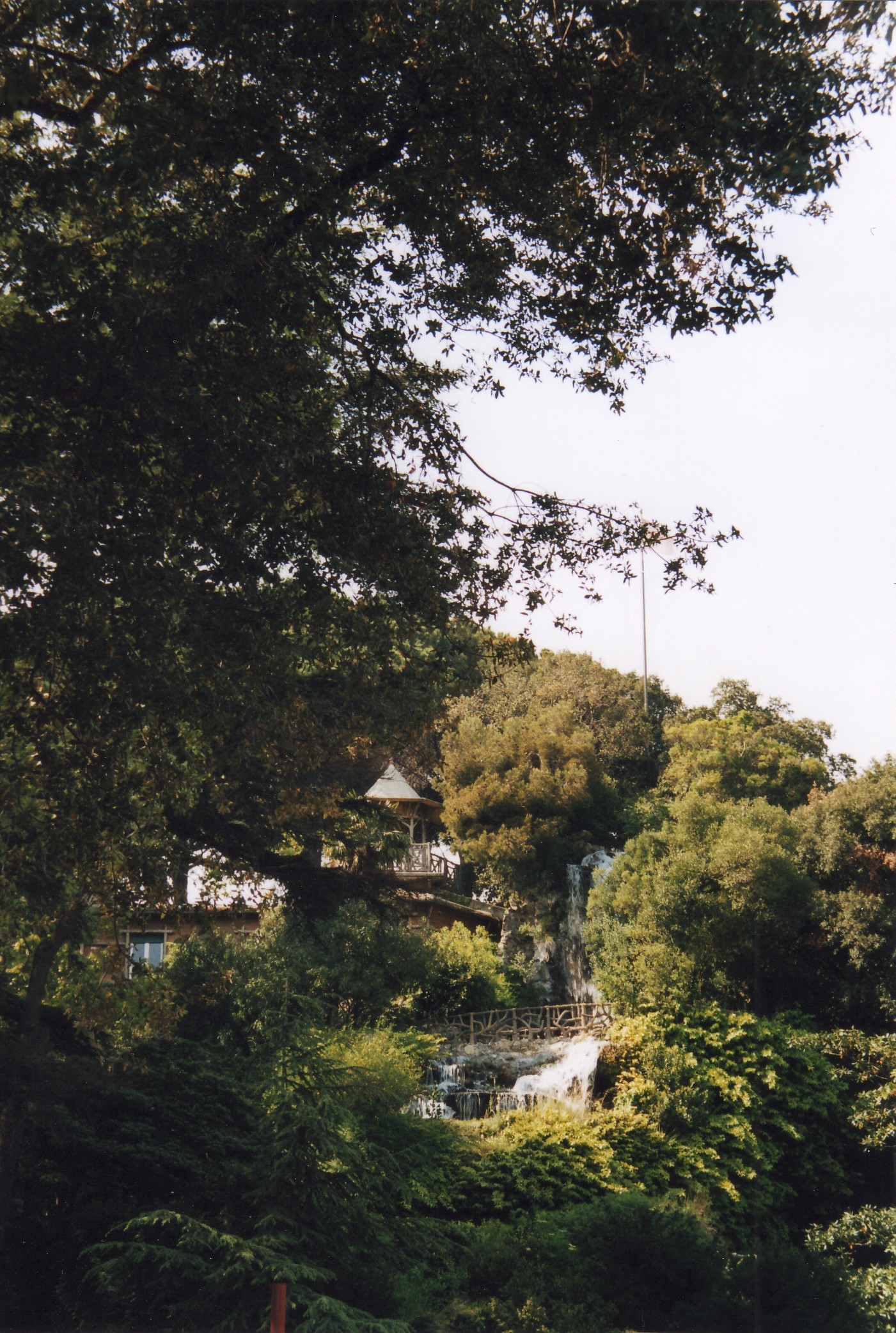 Parco Villetta Di Negro, Genova